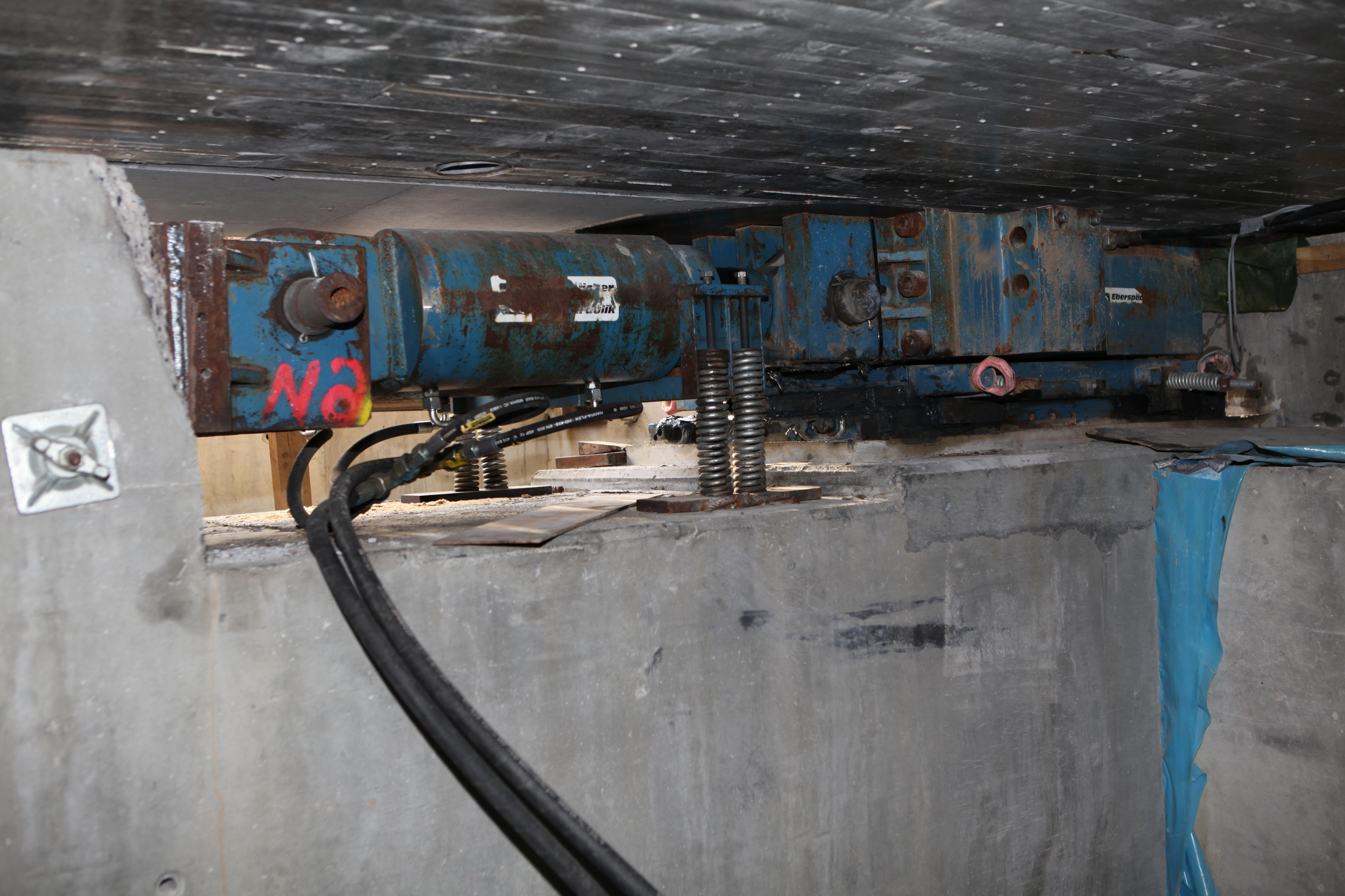 Taktschieben: Zylinder einer Hub-Reibe-Anlage